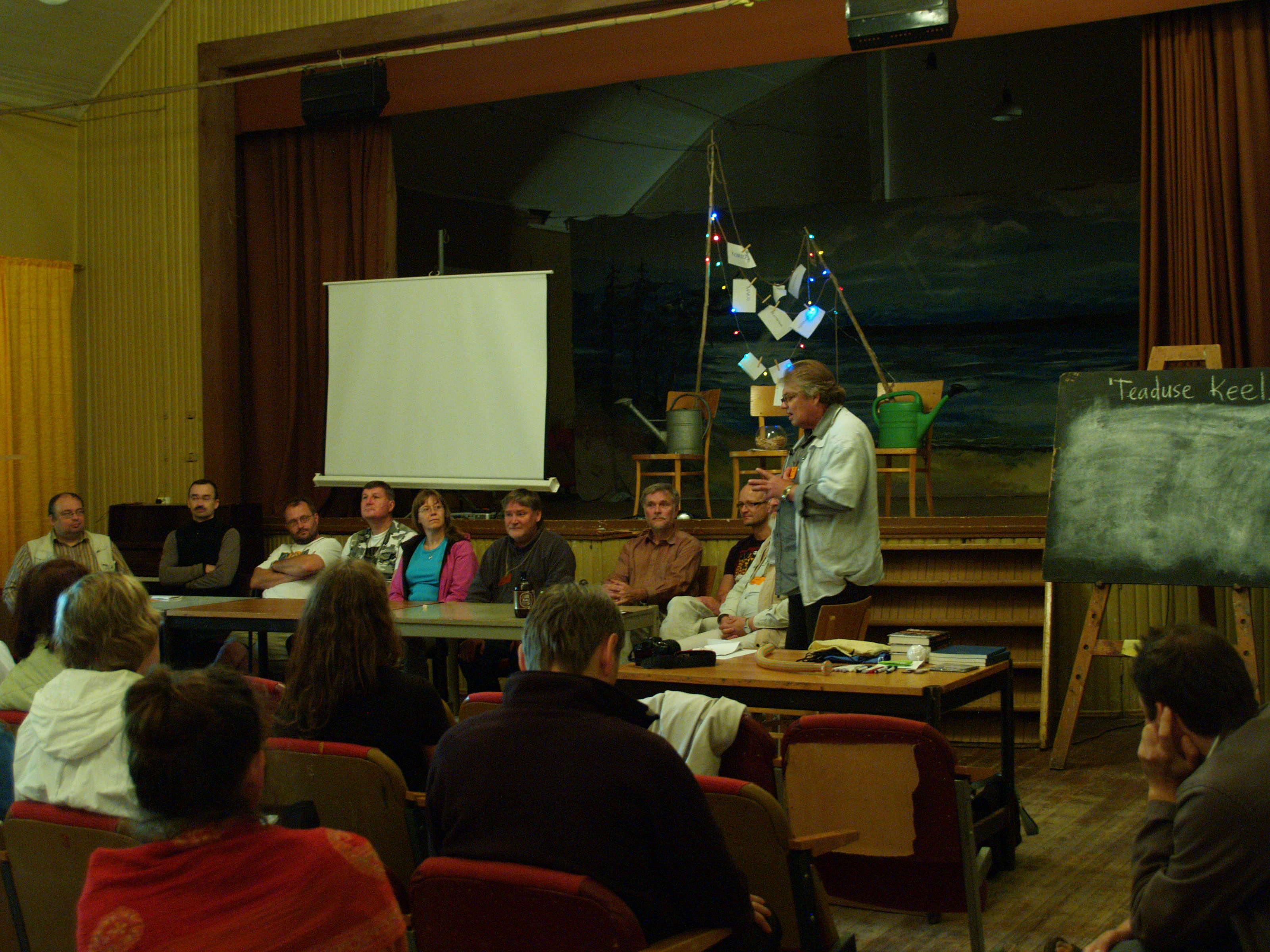 teadus.ee suvekool 2012. aastal Käsmus. Teemaks on "Teaduse keel" ja käsil on suvekooli lõpetav paneeldiskussioon. Räägib Tiit Kändler.